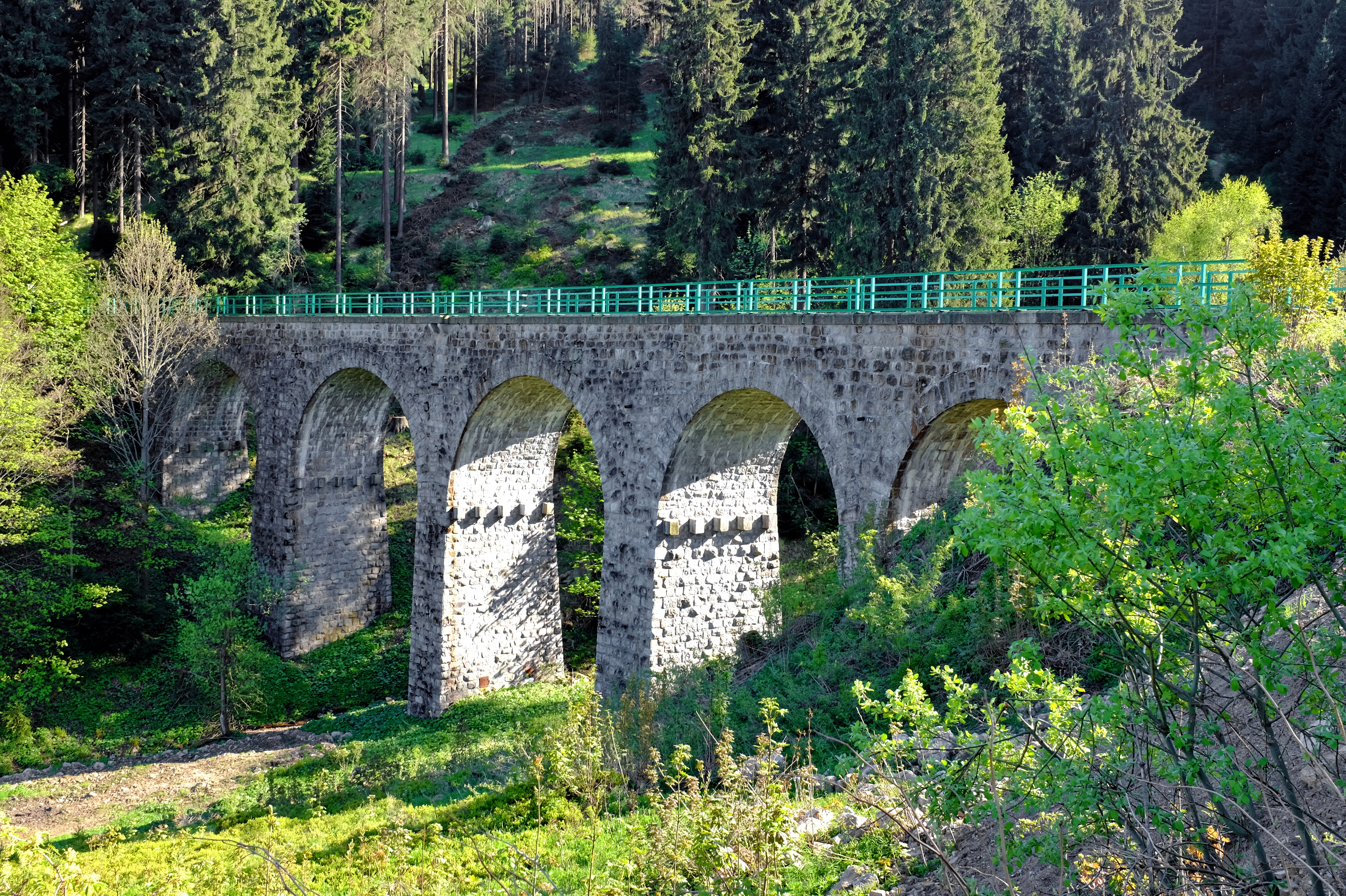 Pernink, obec v Krušných horách, perninský viadukt, okres Karlovy Vary